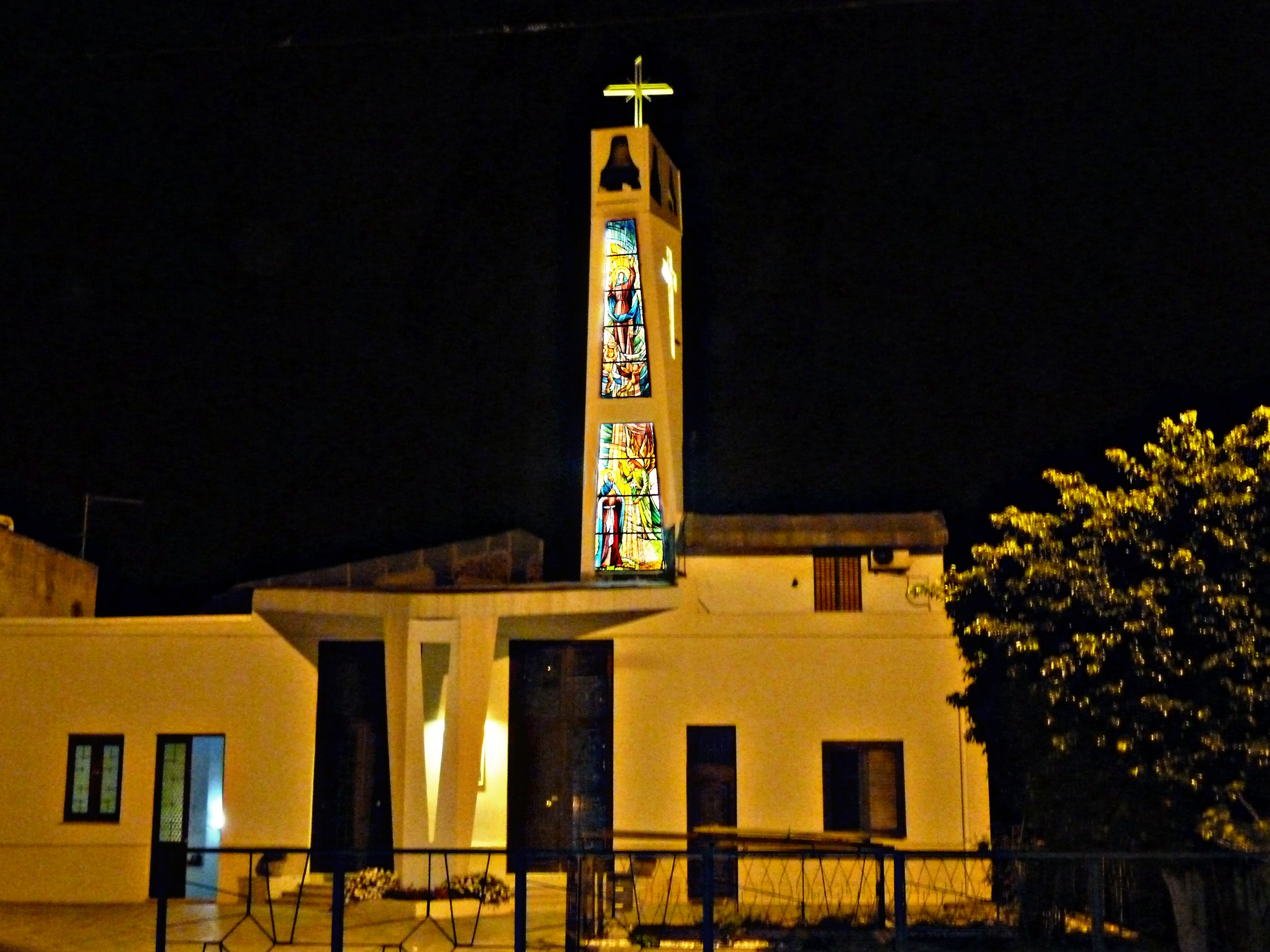 Chiesa dell' Assunta di Nizza di Sicilia, prospetto.